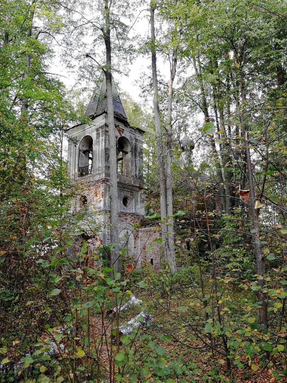 Владимирская церковь: Ламна Малая, Южский район, Ивановская область